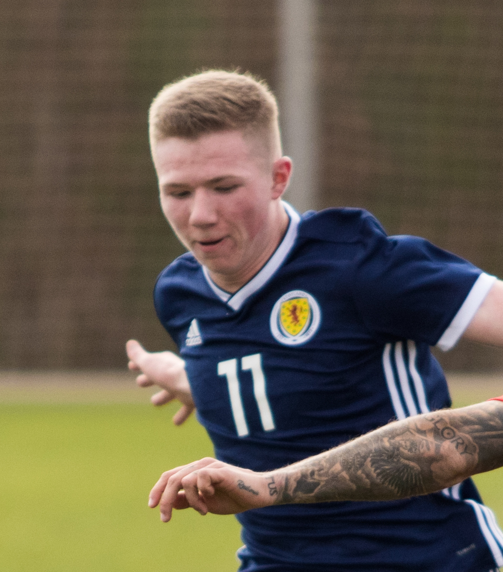 espana-escocia-sub19-67